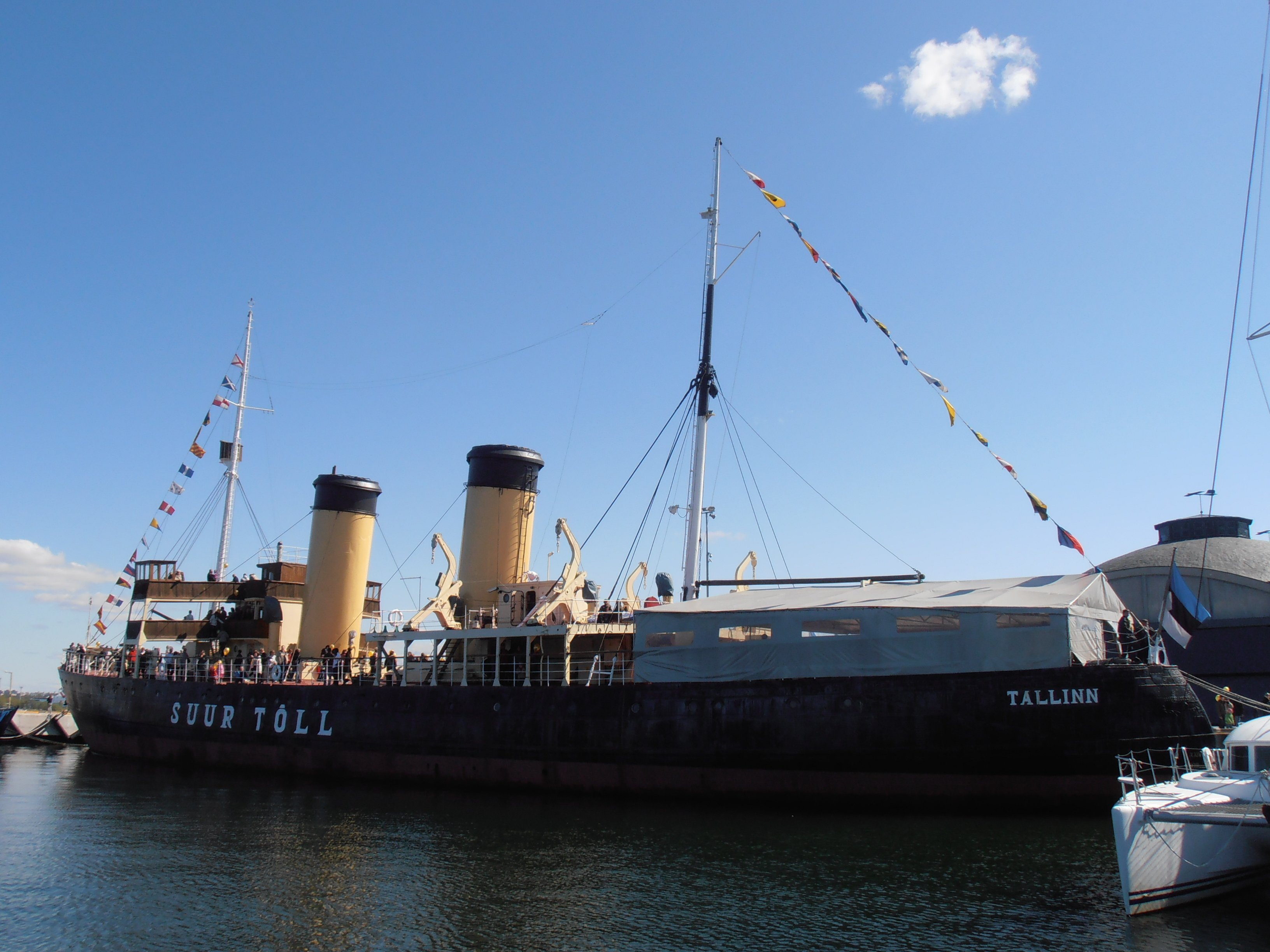 Backbordseite des estnischen Eisbrechers Suur Tõll in Tallinn am 13. Mai 2012